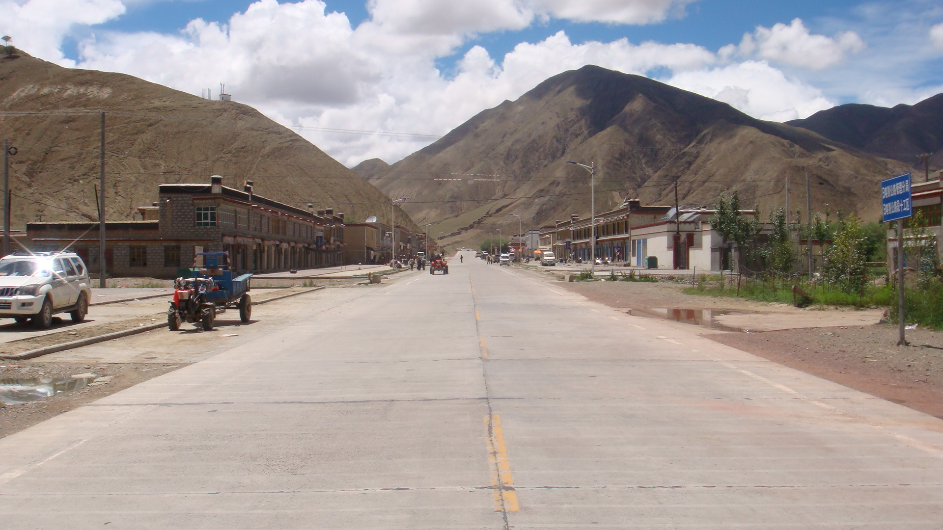 国道318 State Road 318 China Xinjiang Urumqi Welcome you to tour the, Китай Синьцзяна Урумчи приветствовать Вас на экскурсию, الصين ترحب زيارتك لاورومتشى فى شينجيانغ, 中国新疆のウルムチへの訪問を歓迎する, 中国新疆乌鲁木齐欢迎您来观光旅游